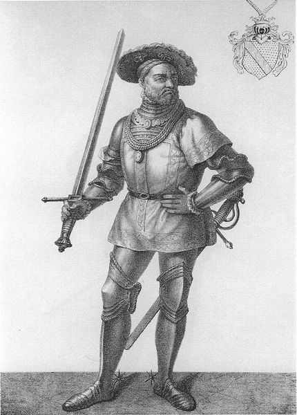 Markgraf Ernst I. von Baden-Durlach